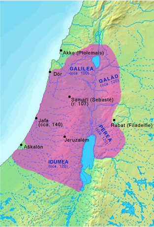 Území říše Hasmonejců s vyznačením let, kdy byla která území dobyta. Disclaimer: With this statement DEMIS BV grants you permission to freely copy the PNG images returned by our server and use them for your own purposes, including web pages. We would appreciate a reference to our server but such a reference is not required, nor do we take responsibility for the accuracy or quality of the maps.